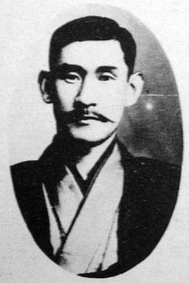 a Japanese man 島村抱月 (Hogetsu Shimamura)